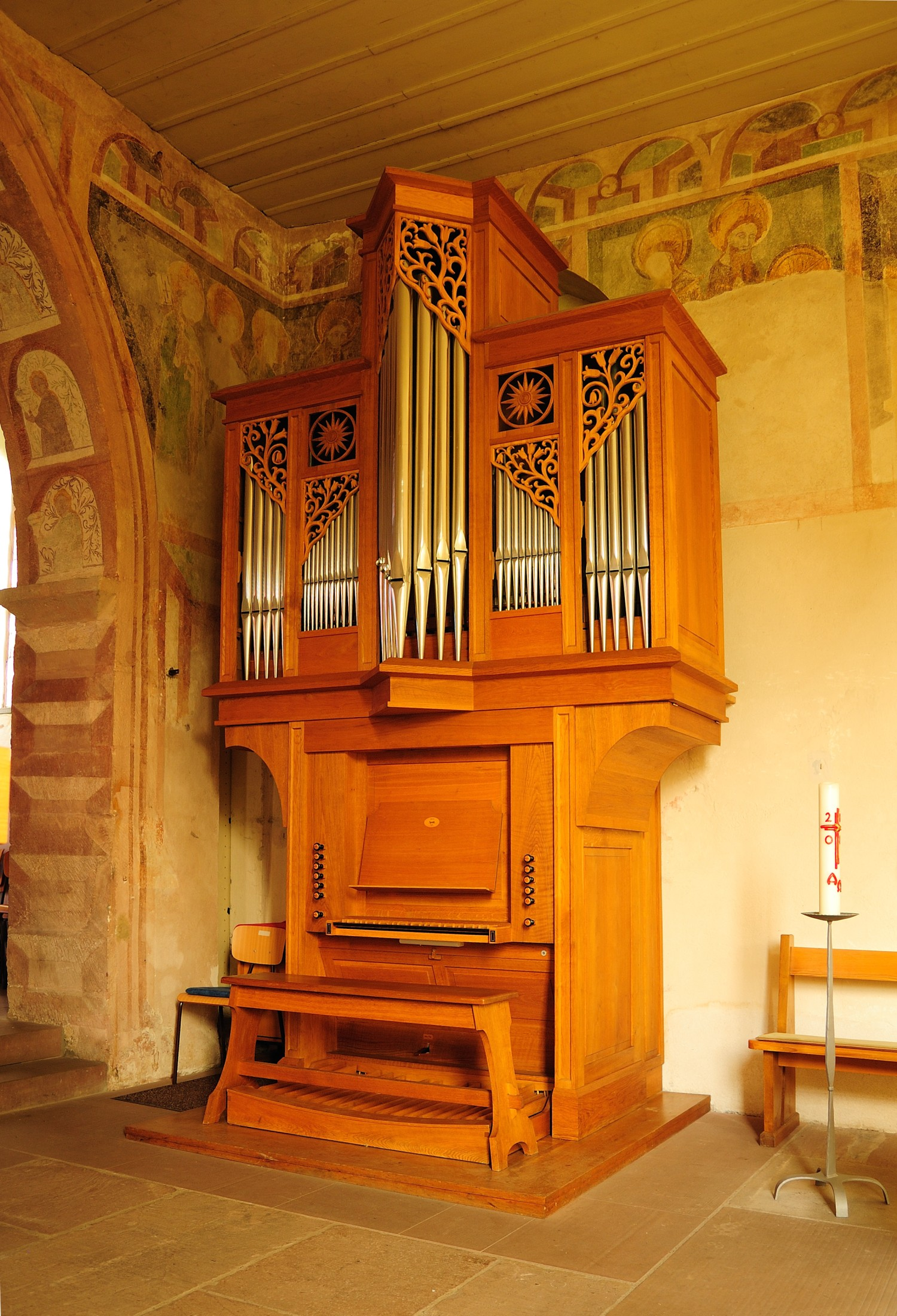 Peterskirche Blansingen: Orgel, links erkennt man im Ansatz den Triumphbogen mit der Darstellung der Klugen Jungfrauen